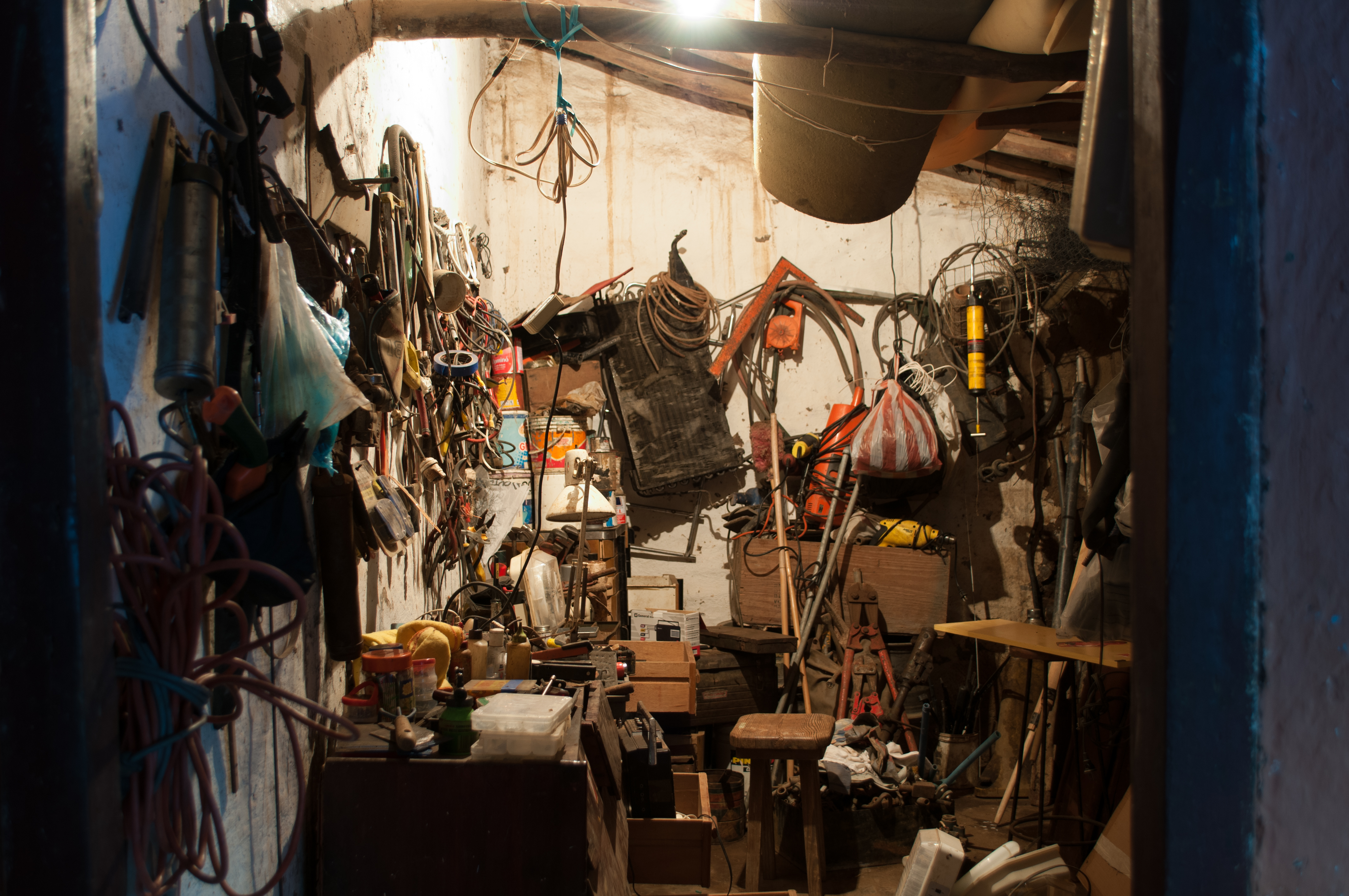 Cuarto para guardar cosas